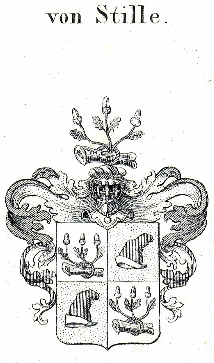 Wappen derer kurbrandenburgischen von Sille; Adelsstand 1690; Feld 2 und 3 ähnlich dem derer von Karstedt (mütterlicherseits).